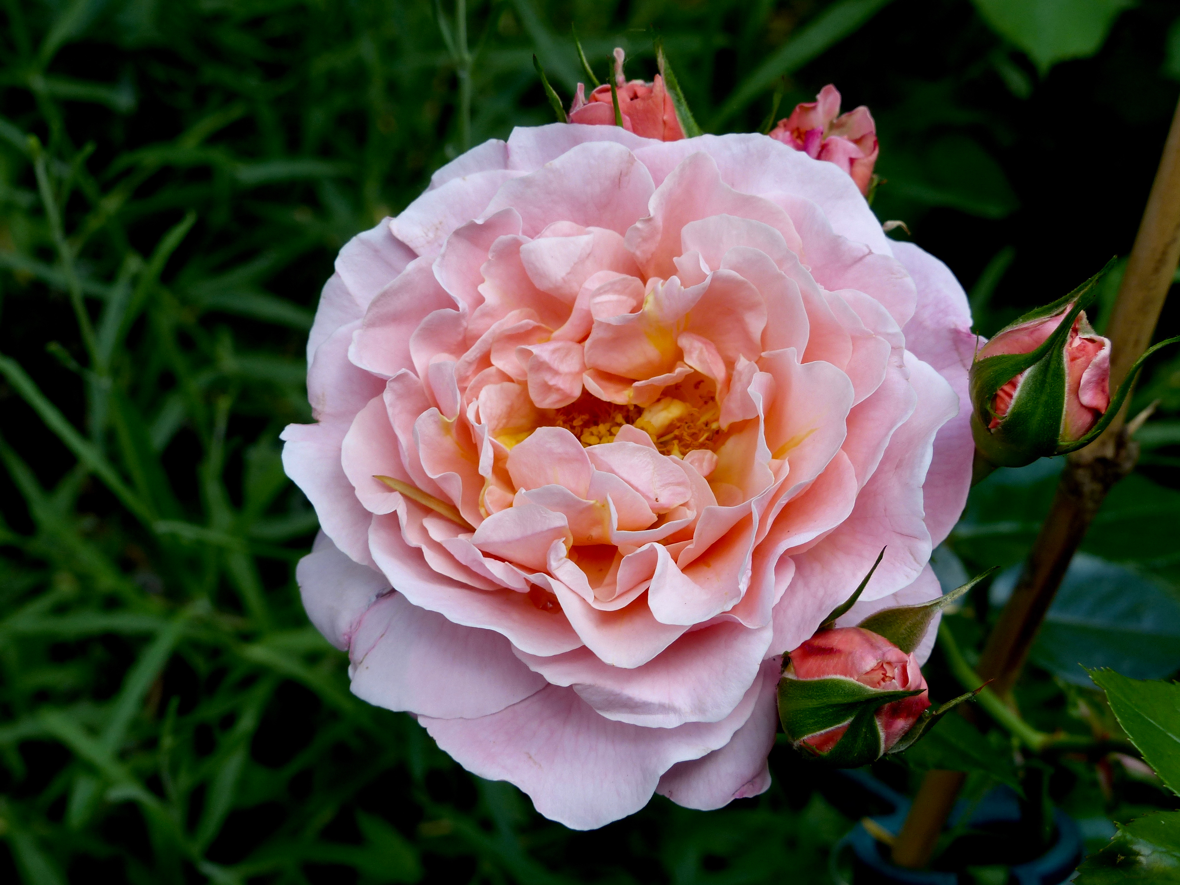 Rosa 'Marie Curie' 2017 in Köln